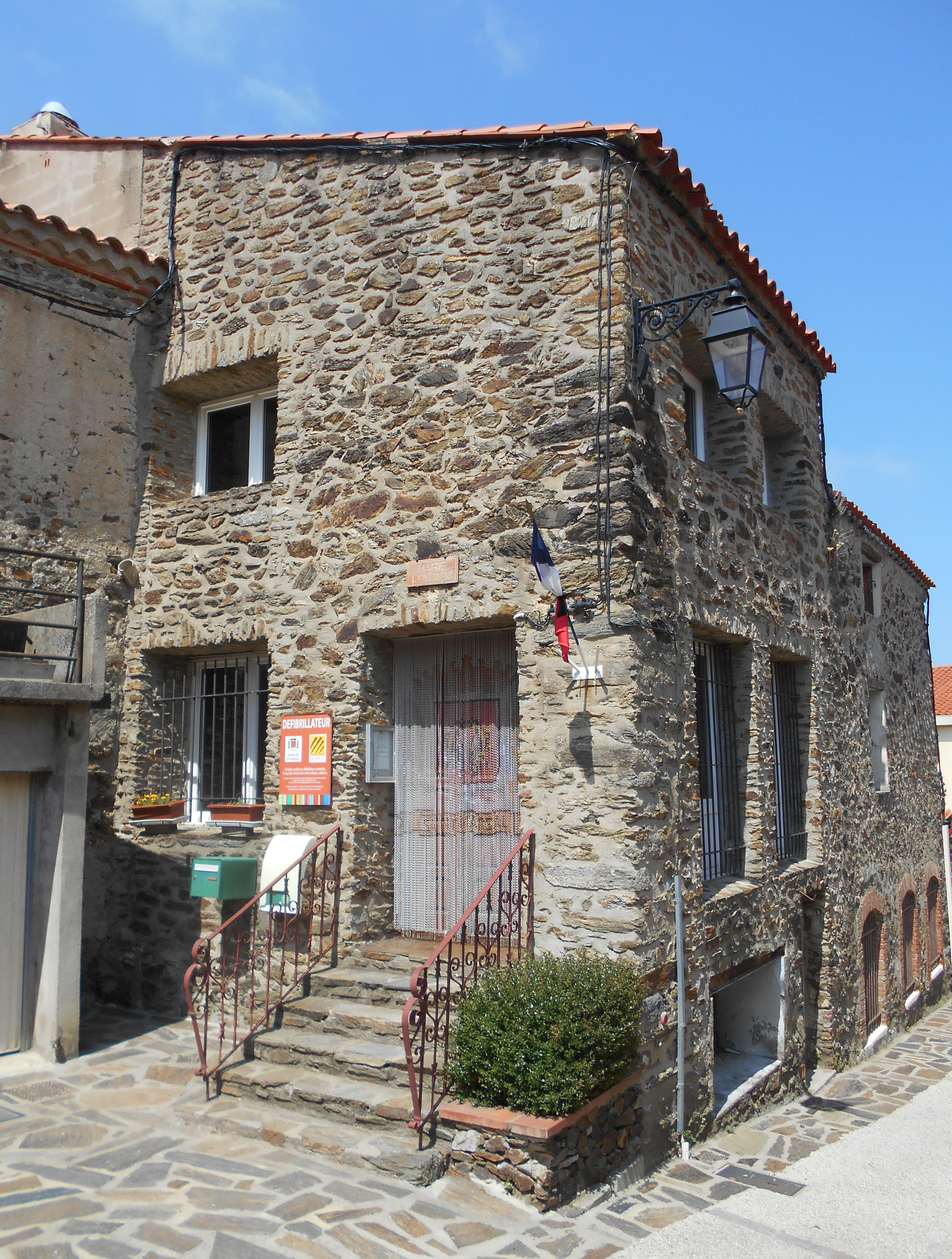 Casa del Comú de Sant Marçal